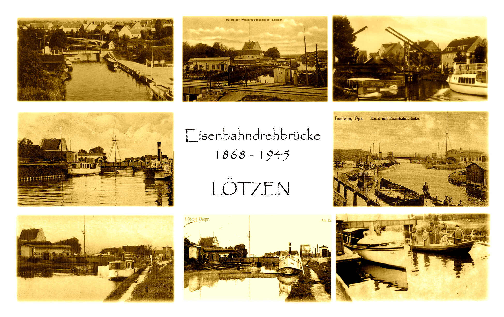 Postkarte mit Eisenbahndrehbrücke Lötzen (mit Titel nachgearbeitet)